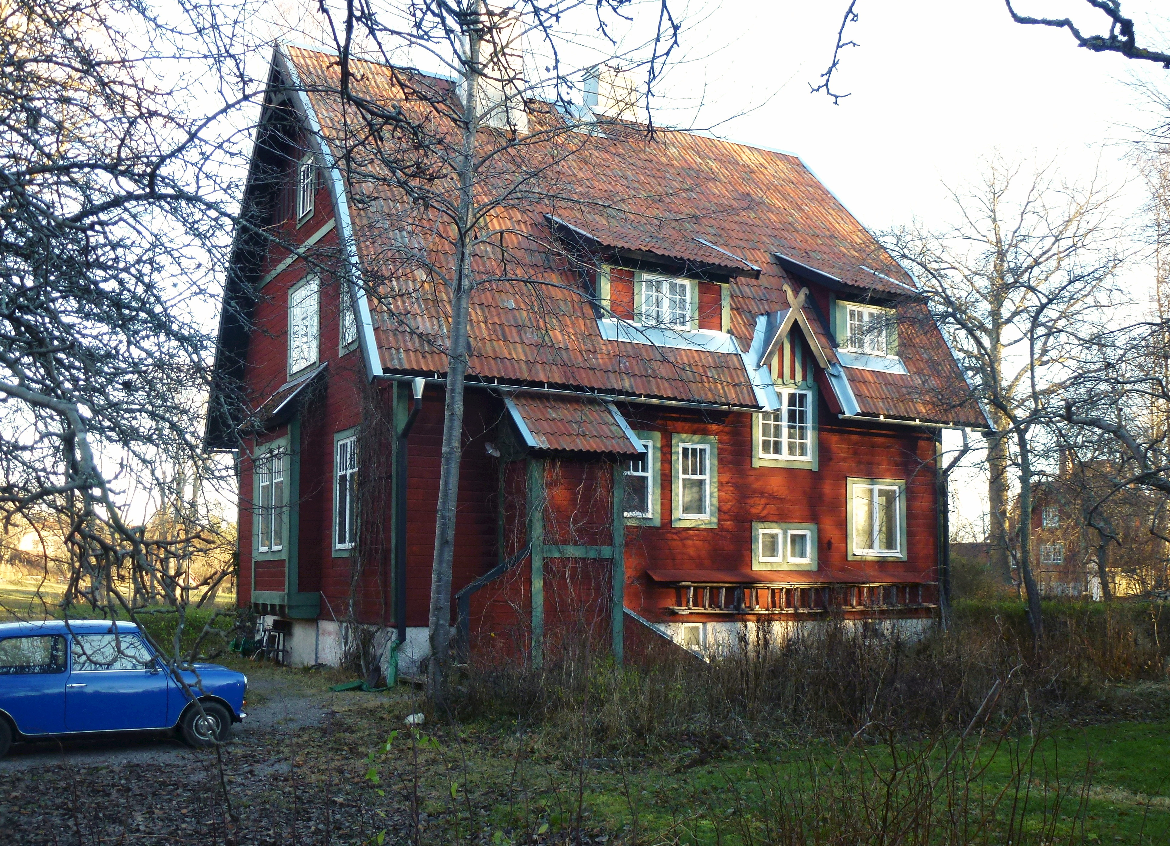 Villa Soltäppan, Ängsvägen 12, arkitekt Gunnar Djurberg